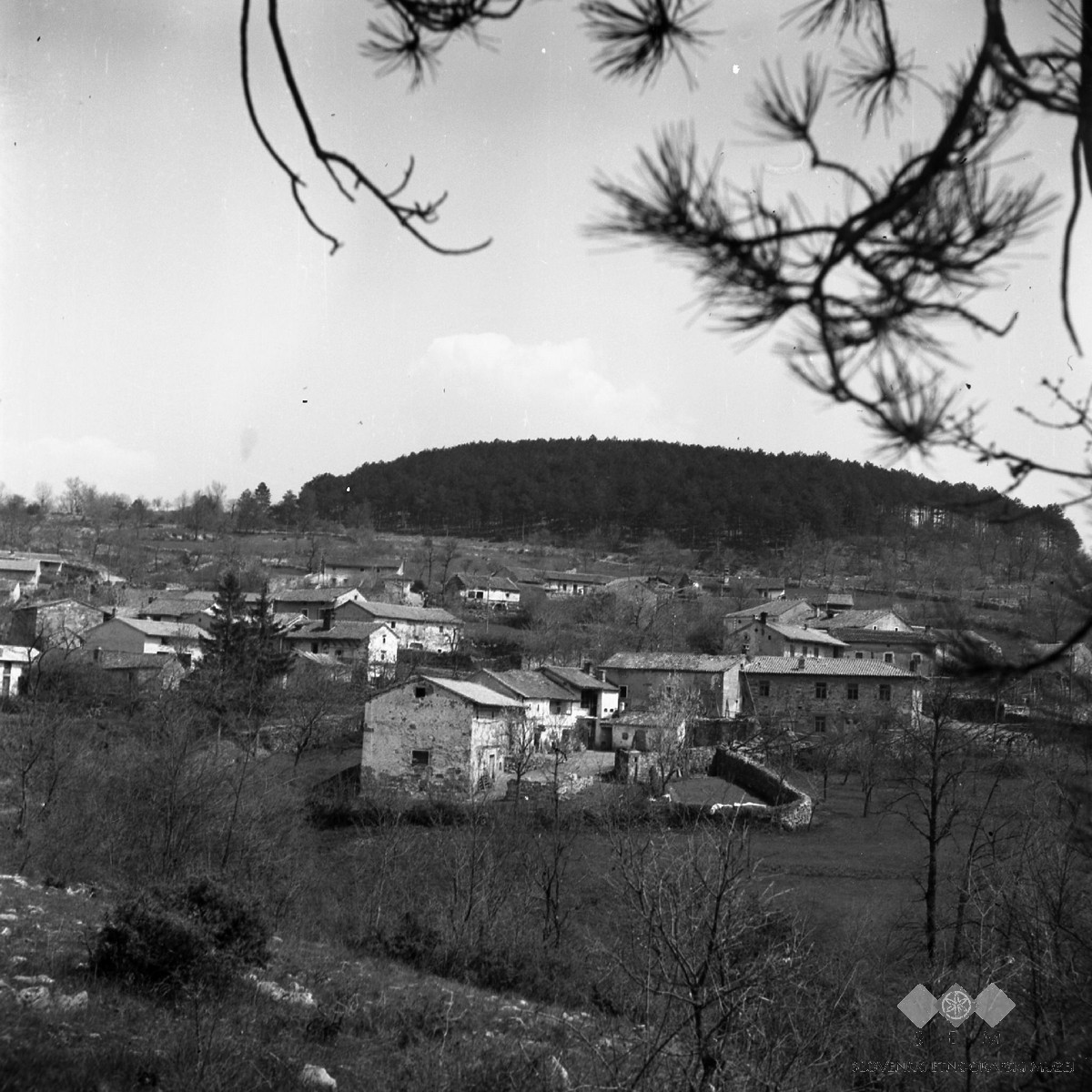 Vreme.